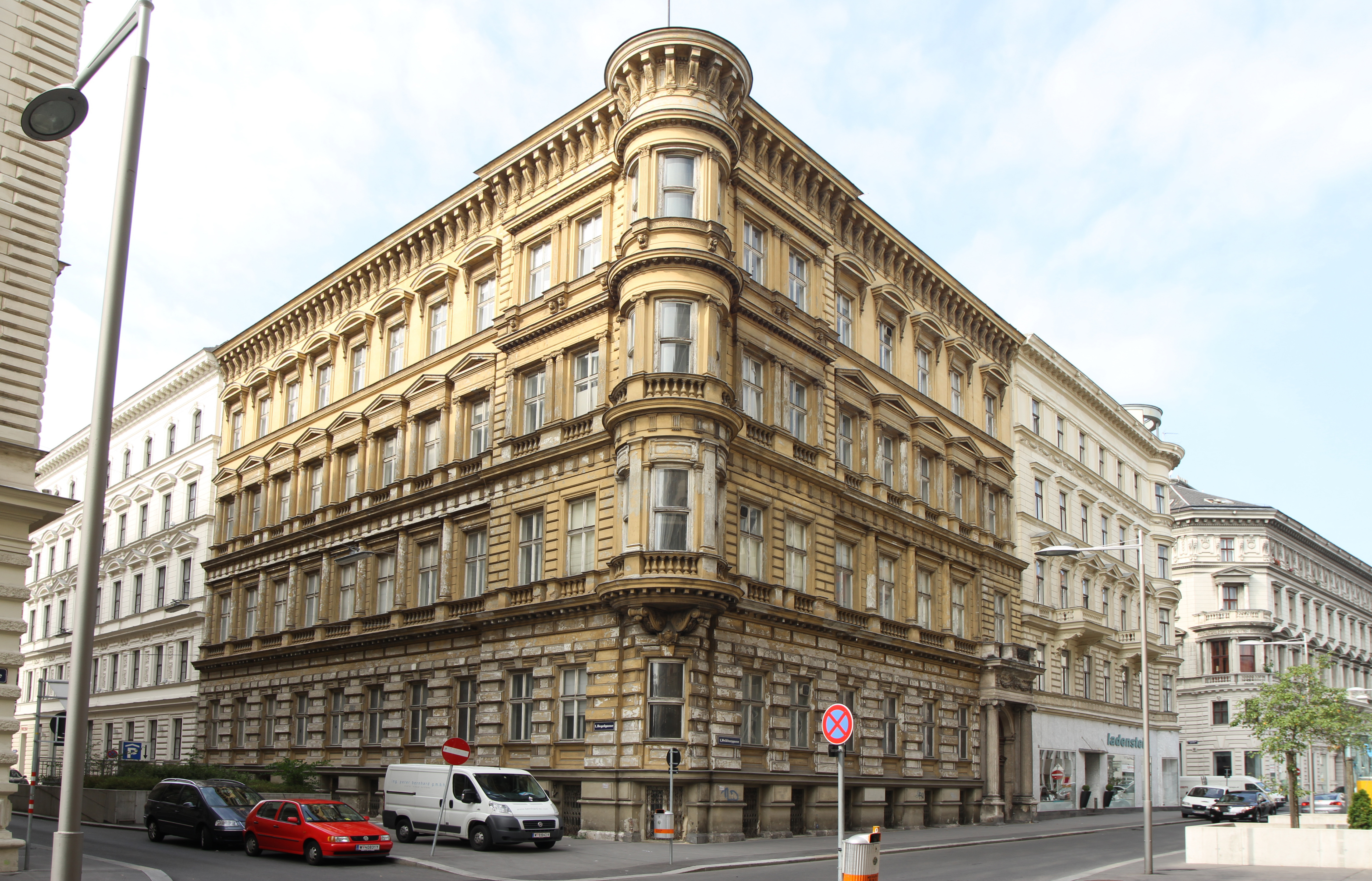 Miethaus, Ehem. Haus Gottlieb Schwab